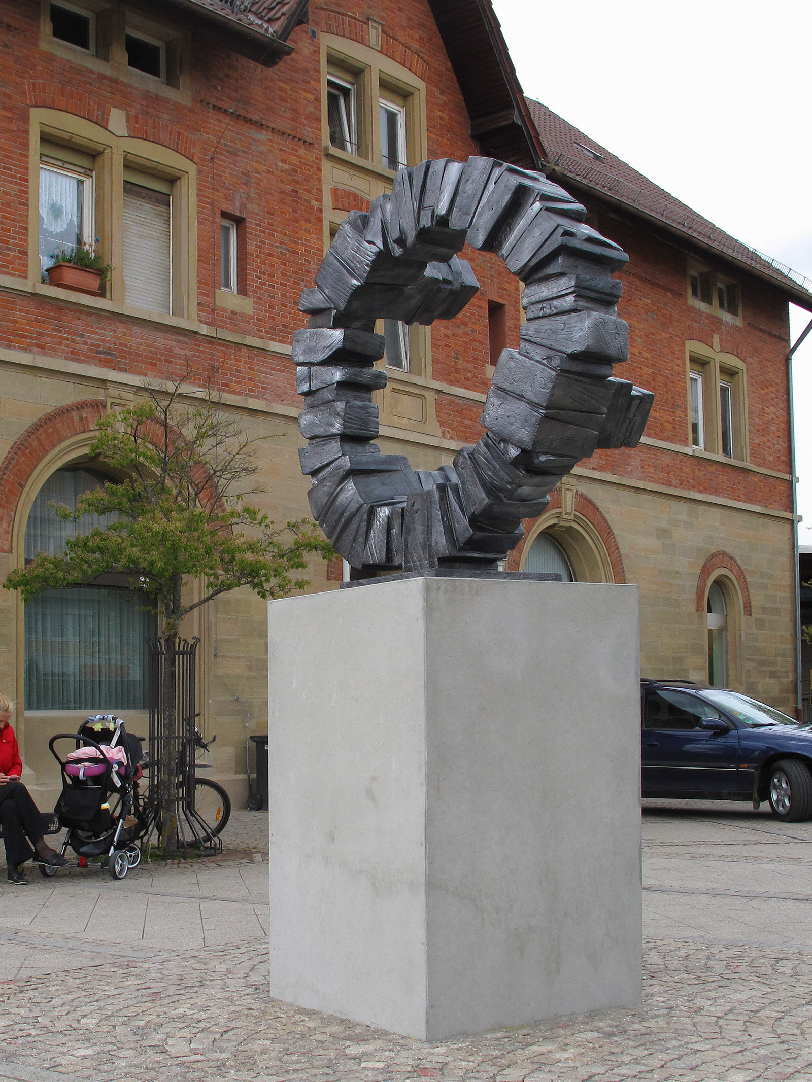 Ingrid Hartlieb, Zwickmühle, 2014, Herrenberg, Jerg Ratgeb Skulpturenpfad